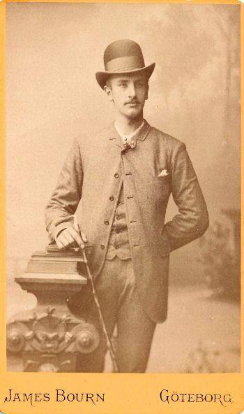 Carl Erik Gadelius svensk affärsman, foto ca 1910-20